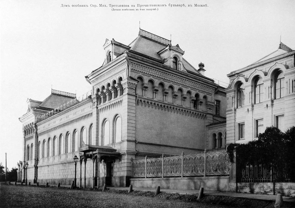 Gogolevsky Boulevard, 6 - Sergey Tretyakov House